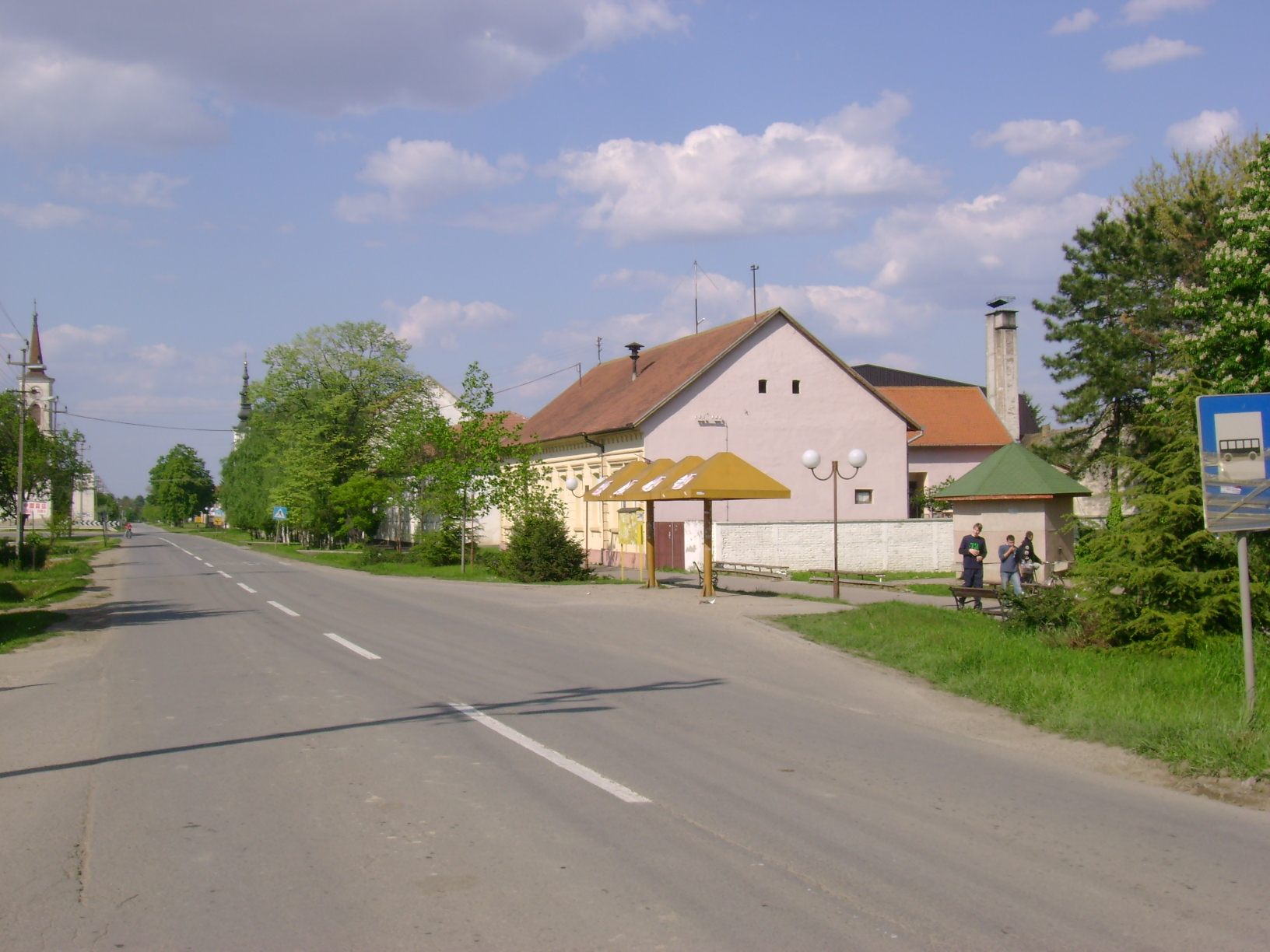 Главна улица и центар села